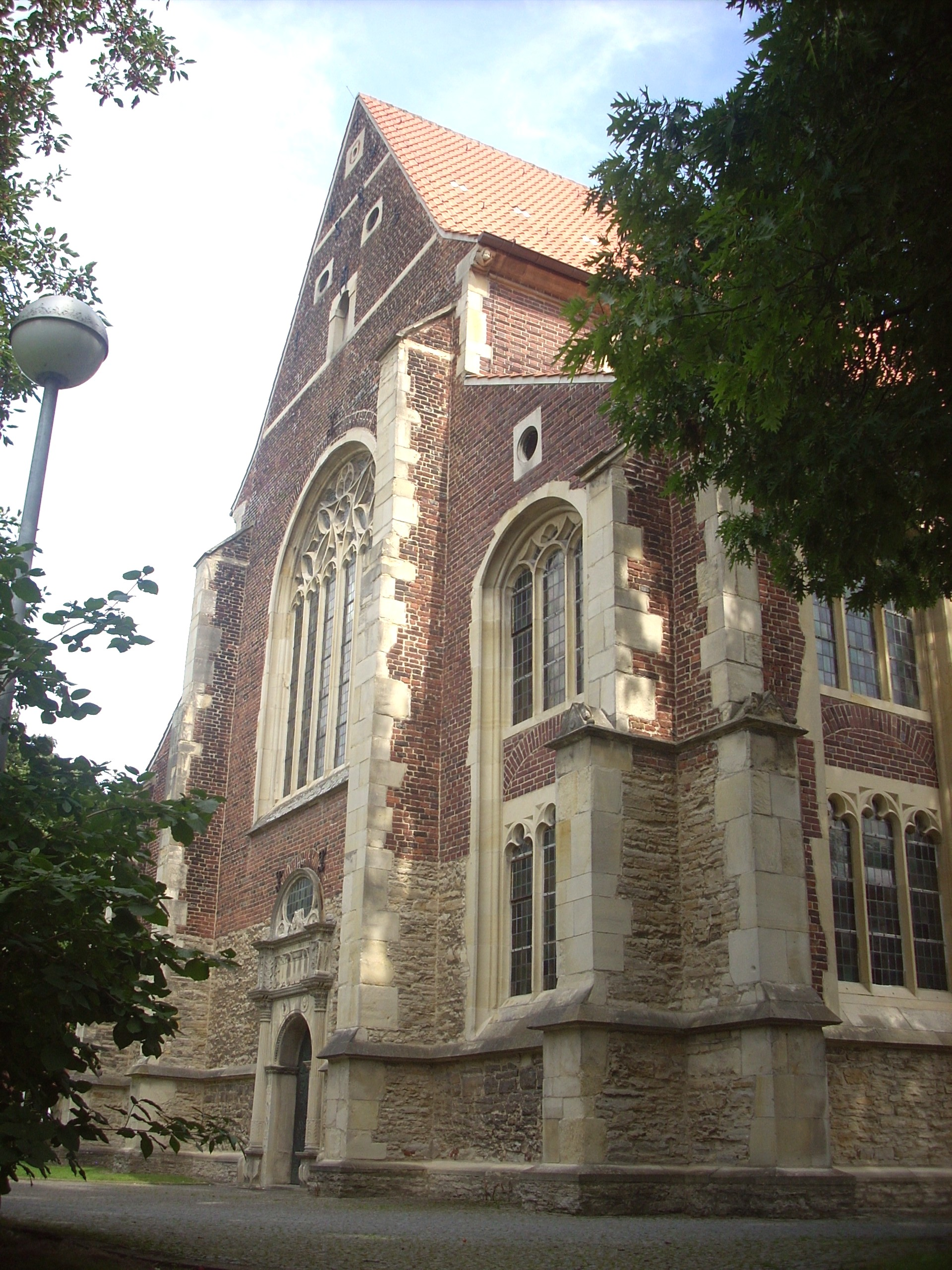 Münster, St. Petri, Westgiebel